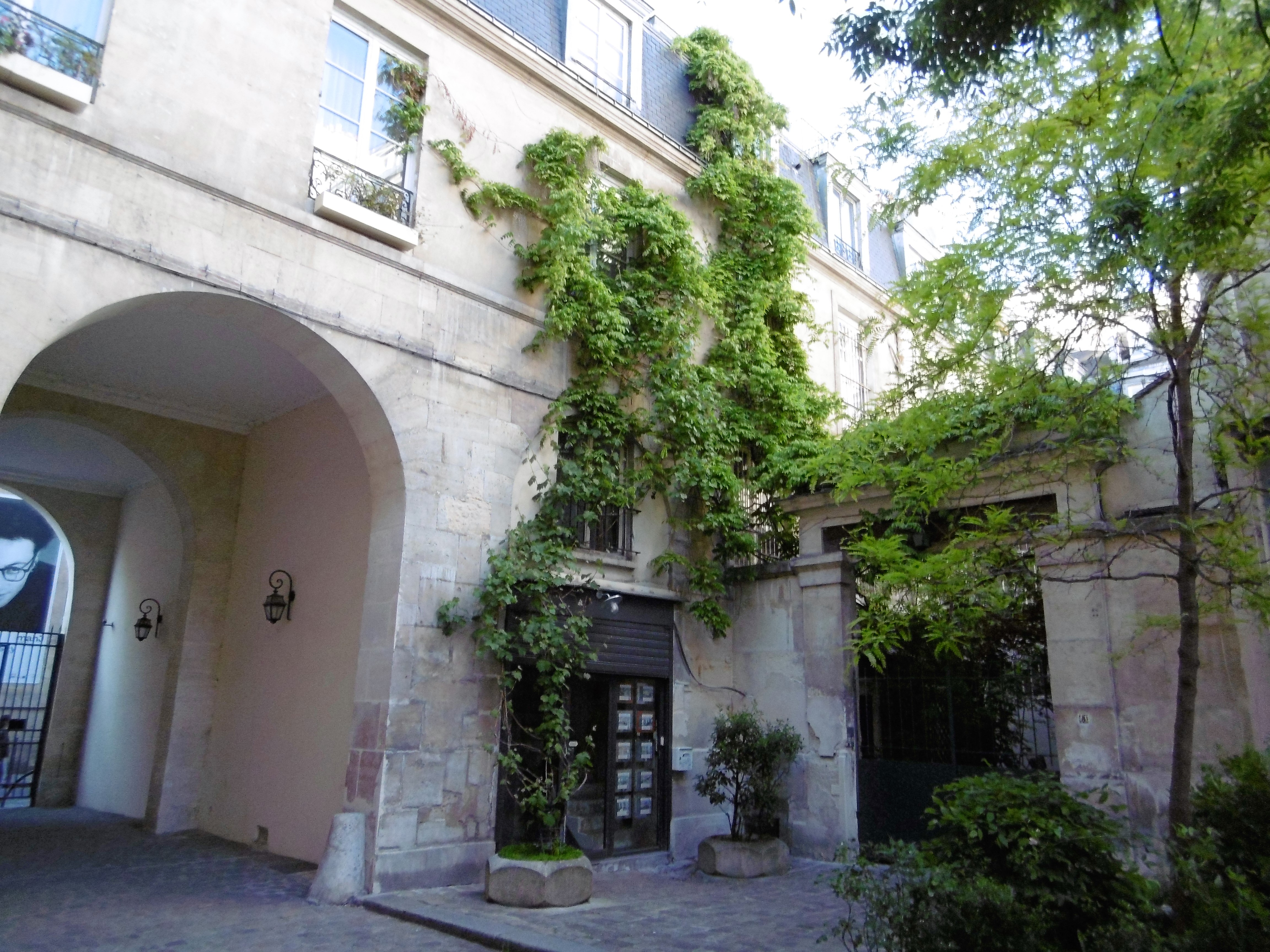 Rue du Temple 62 passage Ste-Avoye ancien hôtel de Mesmes portails